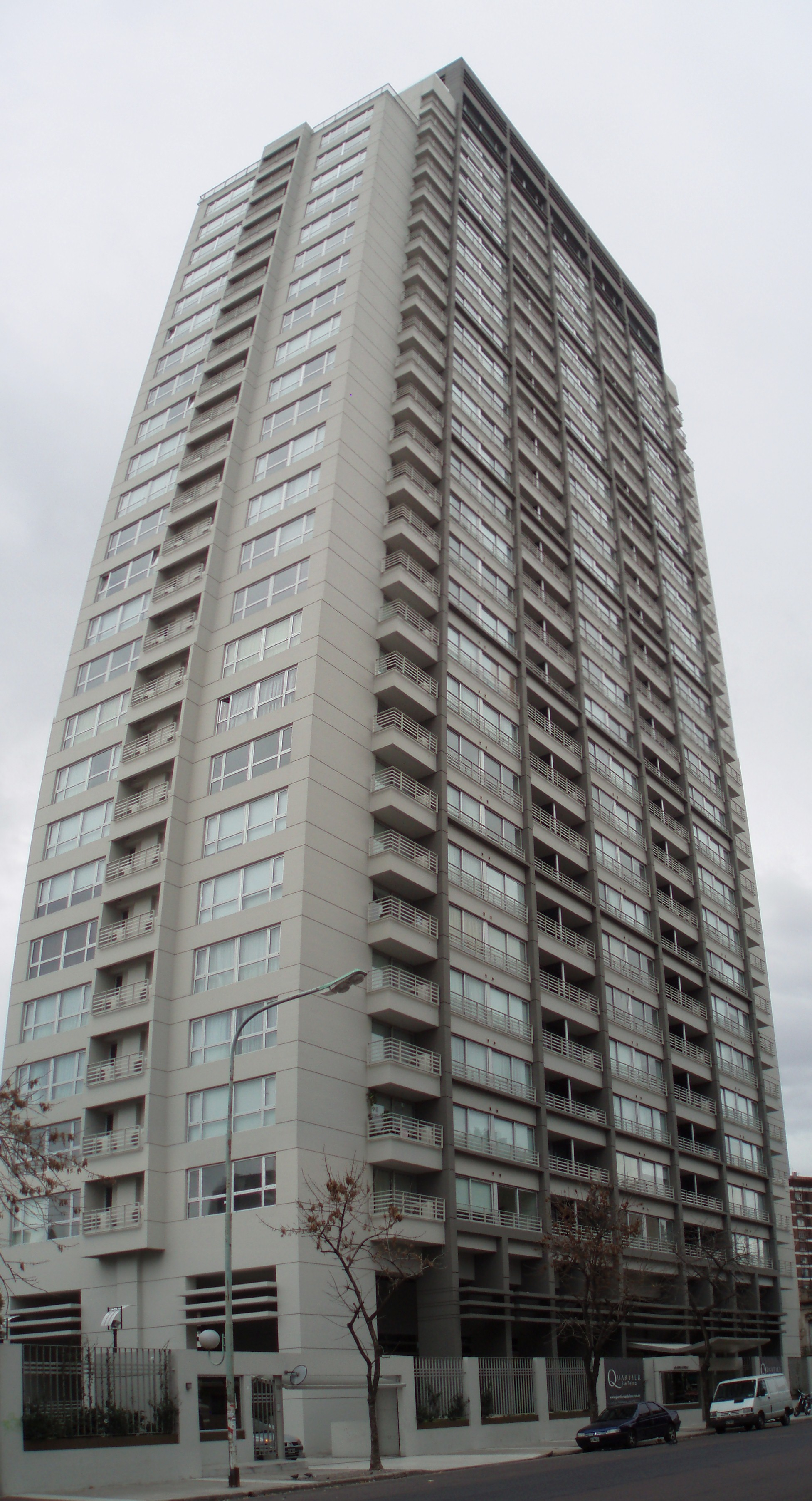 Torre Quartier San Telmo en Buenos Aires.